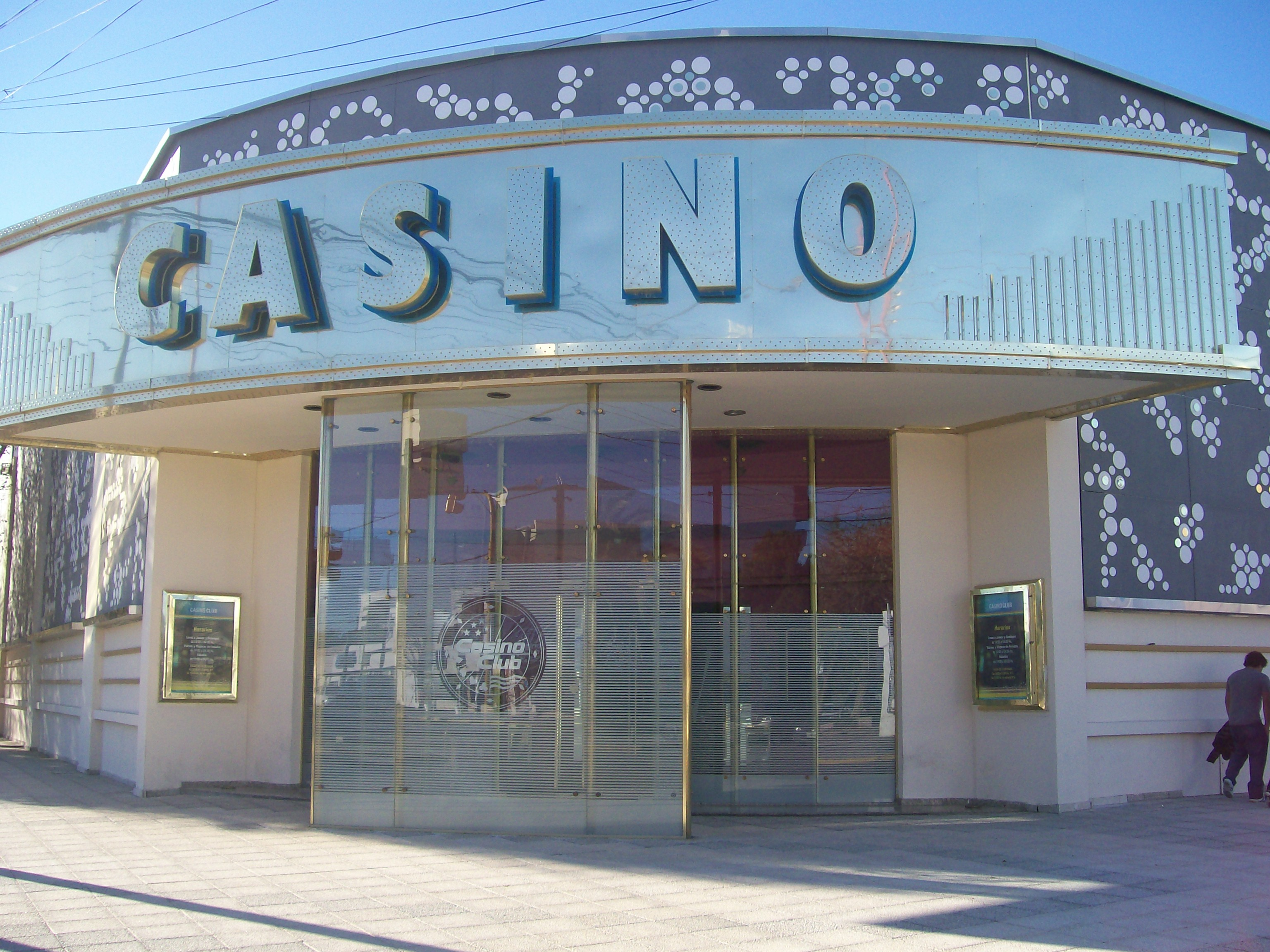 vista al casino de caleta